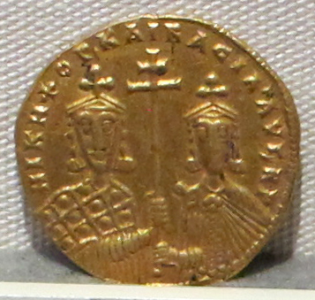 Palazzo Massimo alle Terme